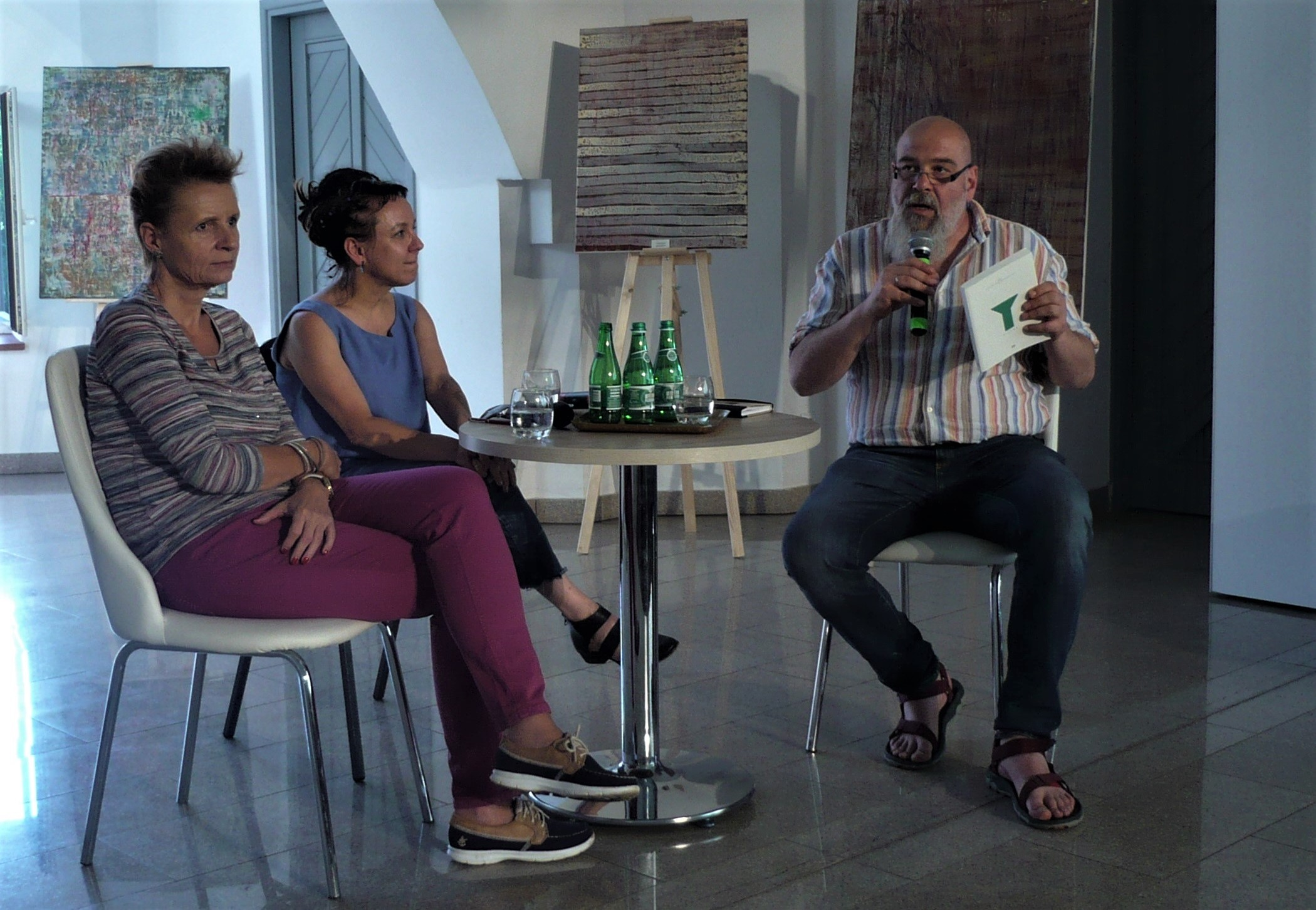 Małgorzata Omilanowska, Olga Tokarczuk, Irek Grin, Festiwal Góry Literatury, 2018